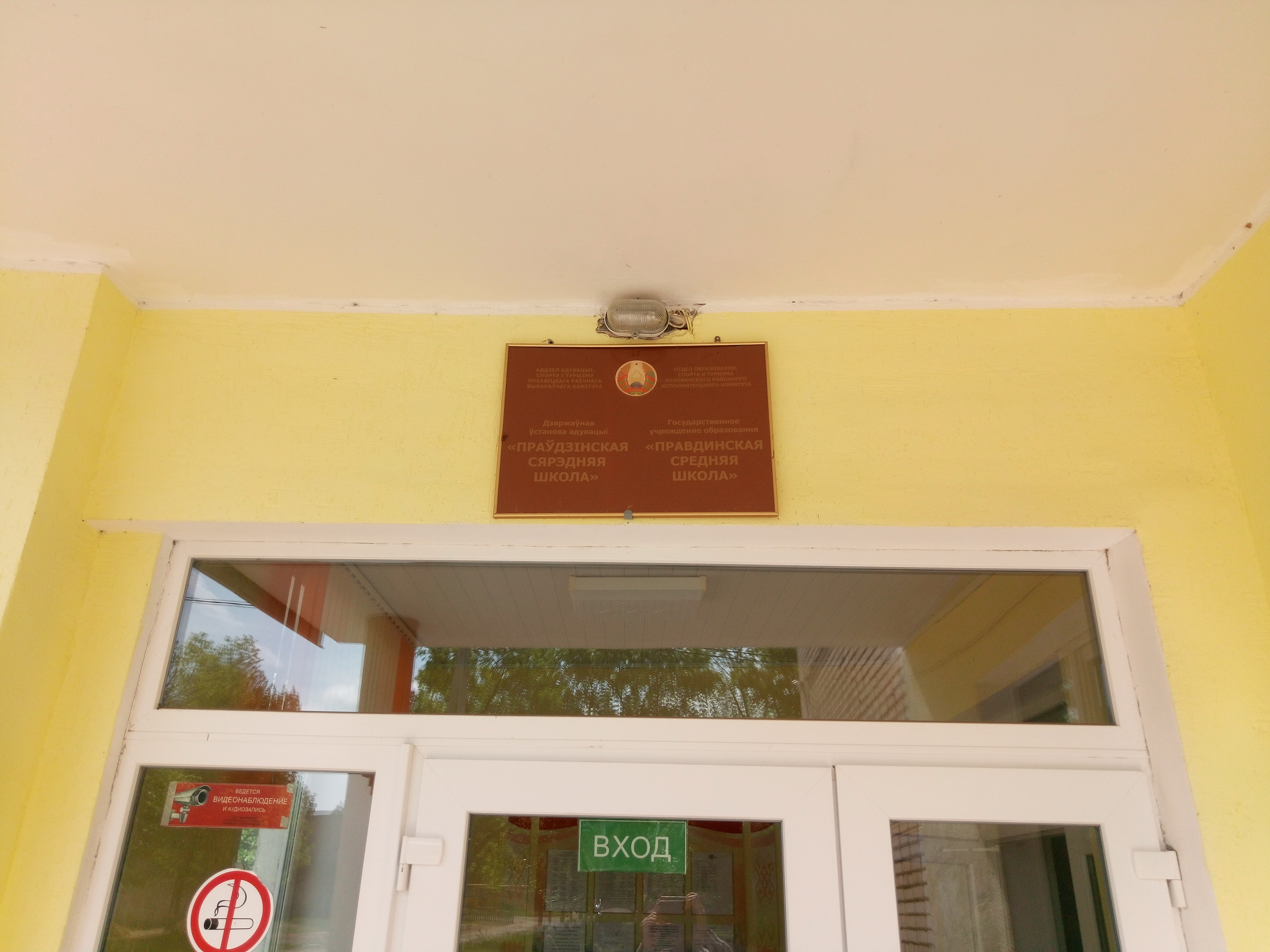 Праўдзінская сярэдняя школа, таблічка.